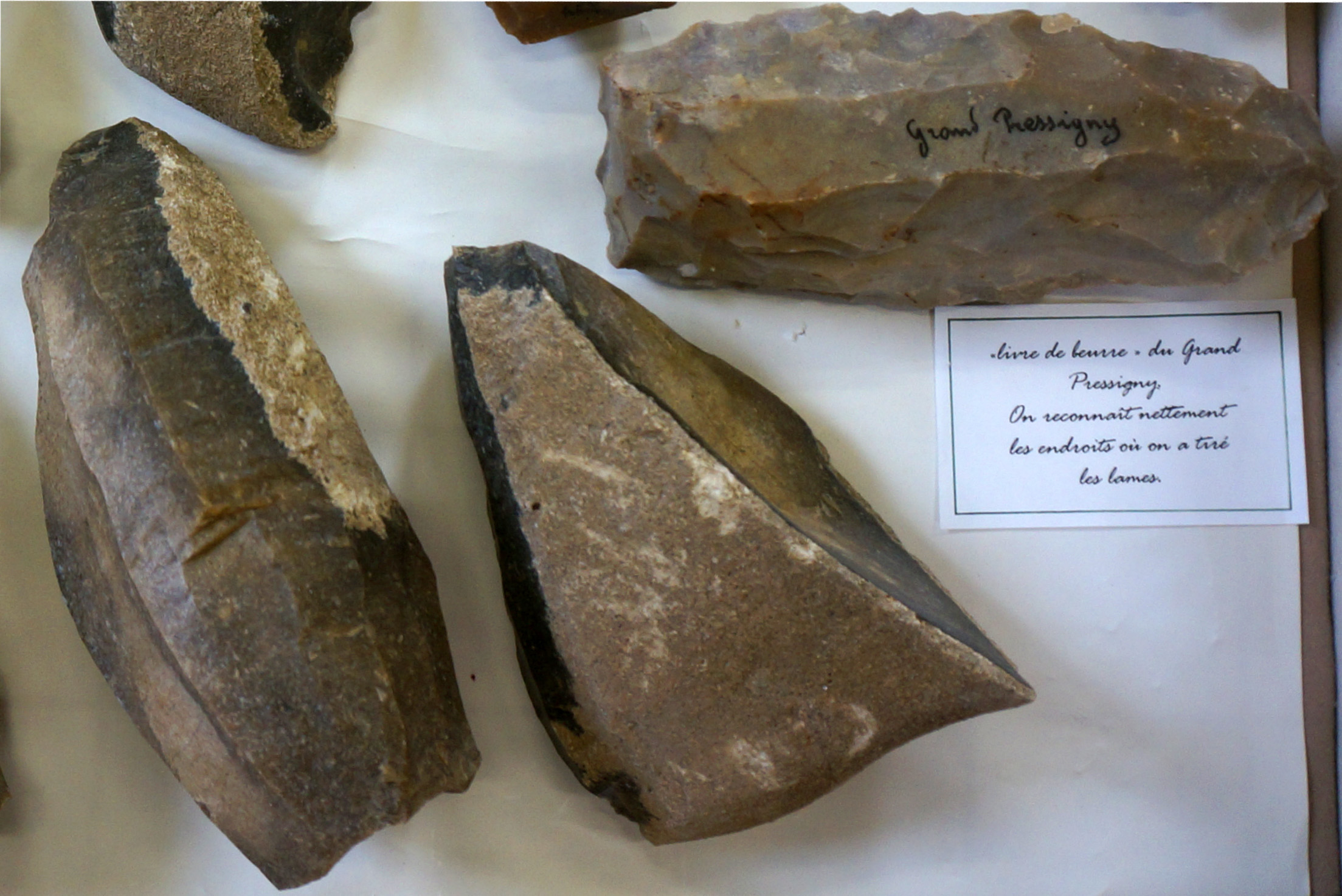 présentées au Musée archéologique de Pons.